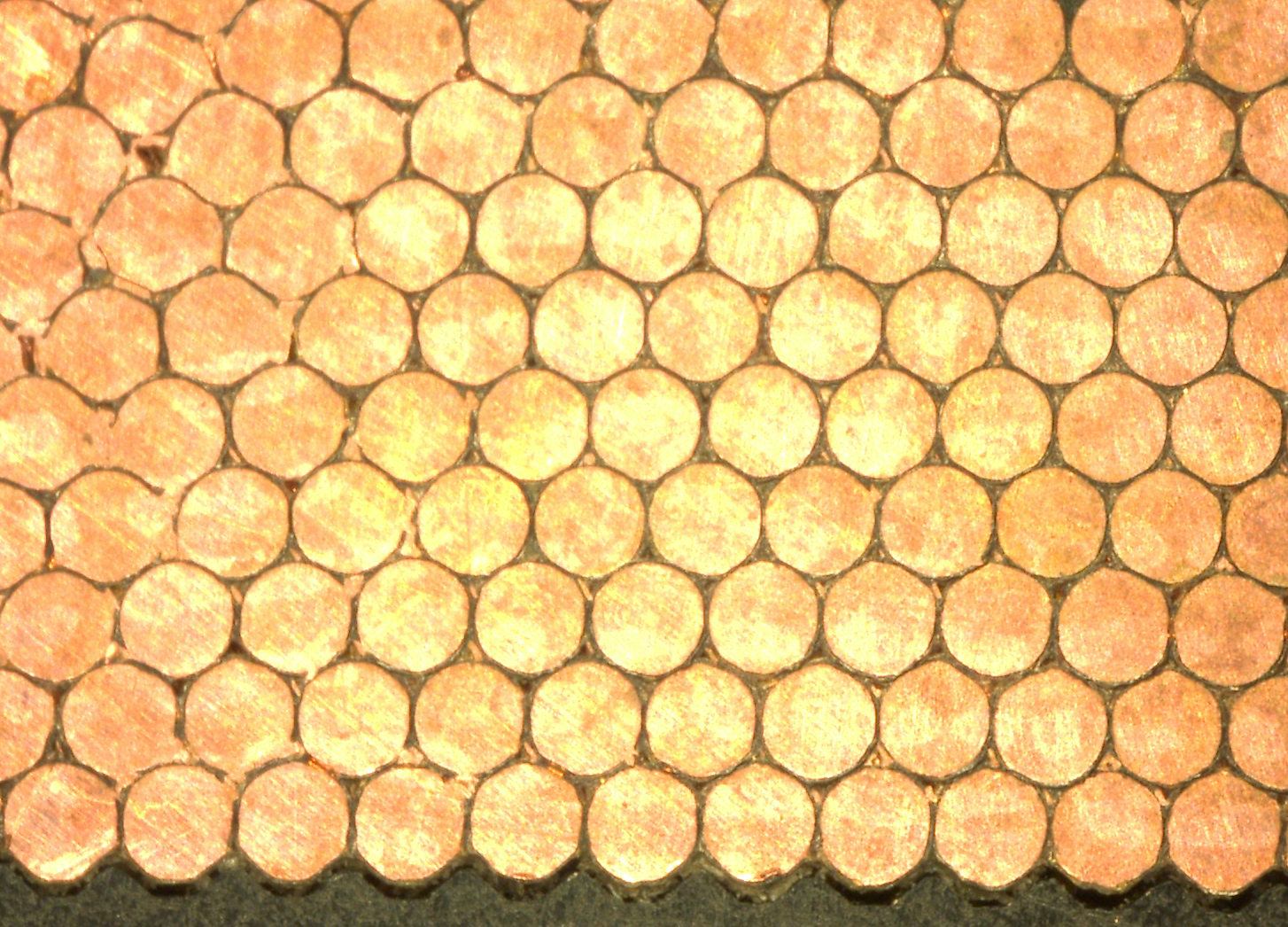 Schliffbild 1